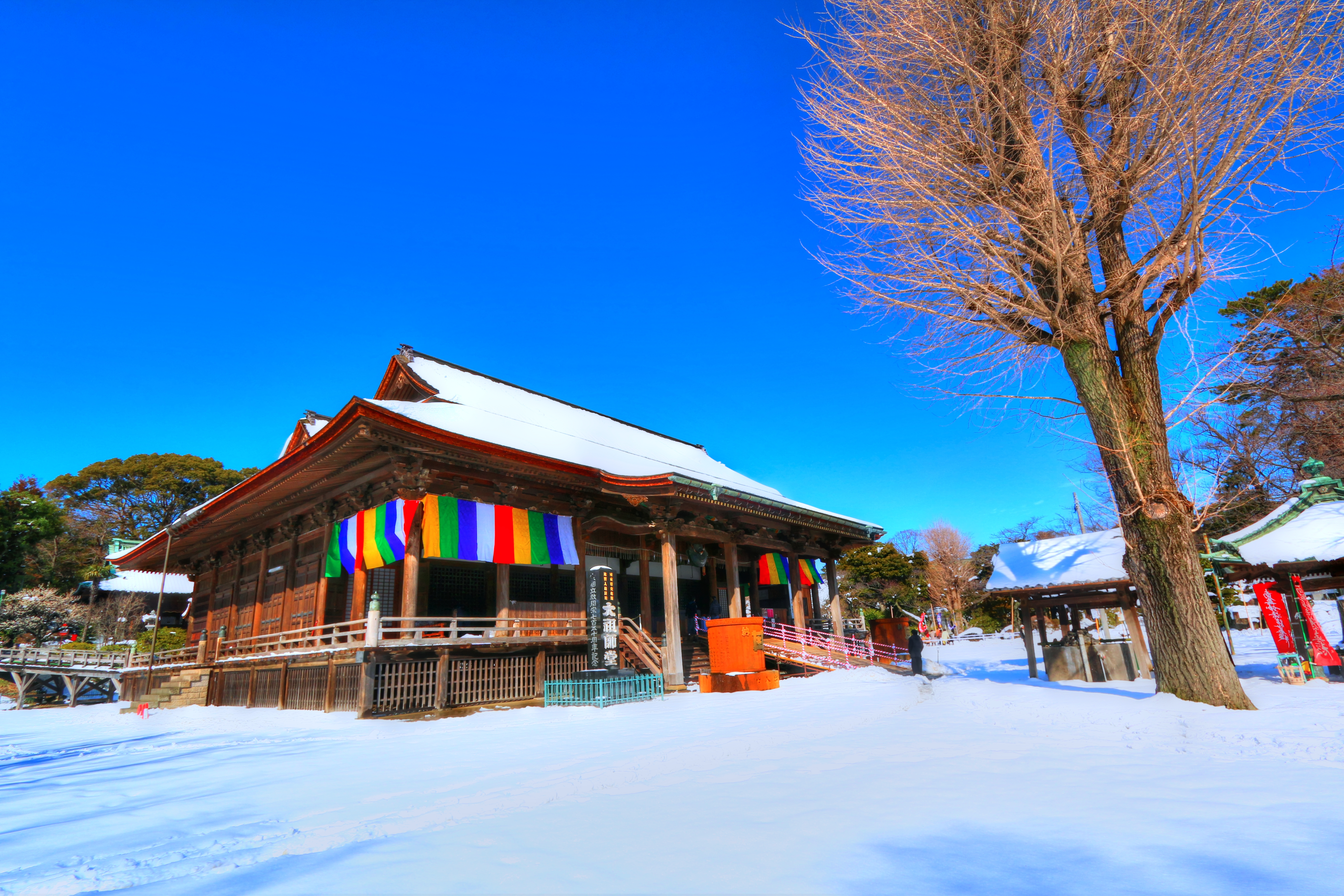 中山法華経寺